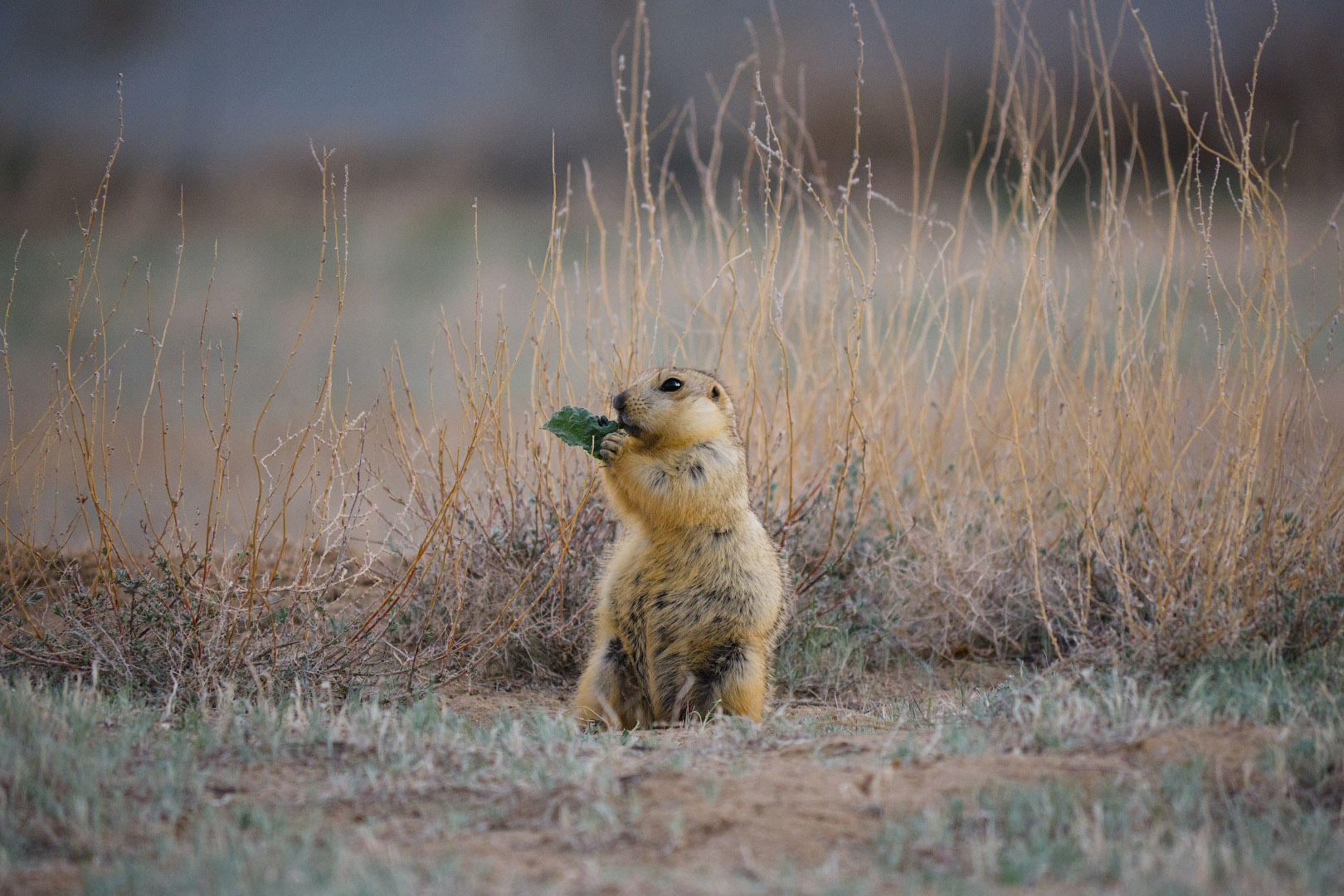 Ужин желтого суслика